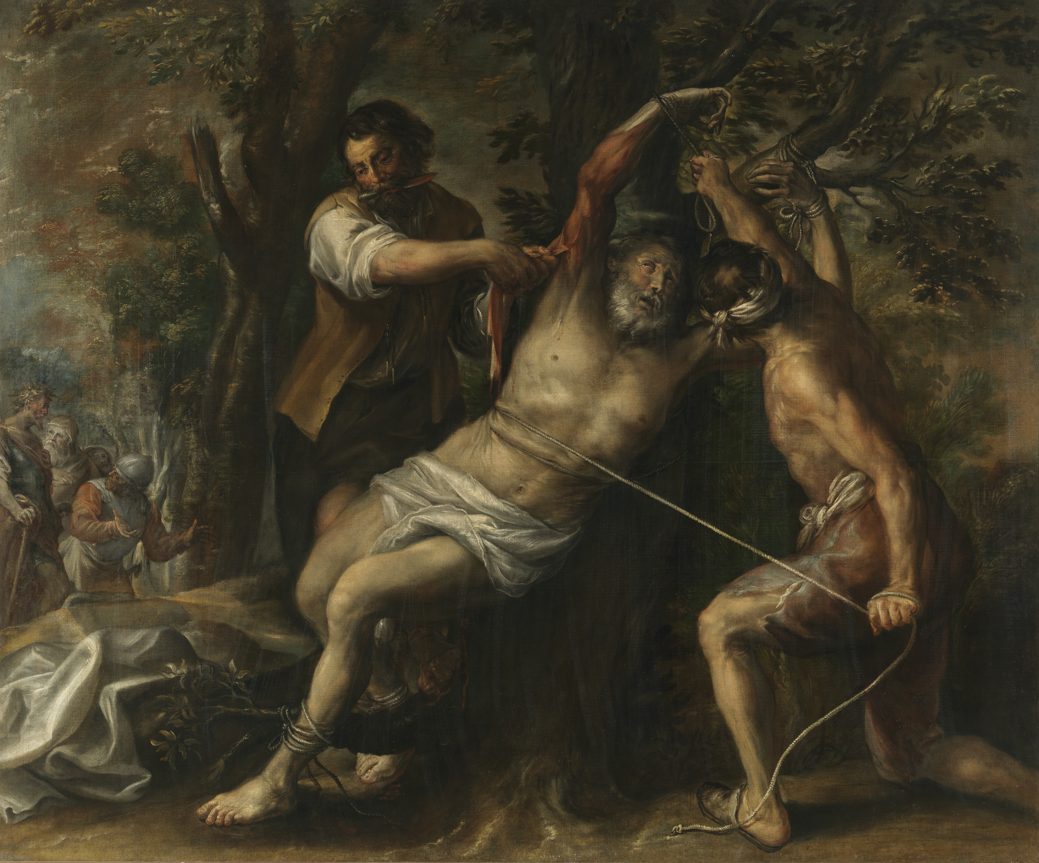 La obra representa el martirio del apóstol San Bartolomé, que según la tradición fue desollado vivo en Armenia.